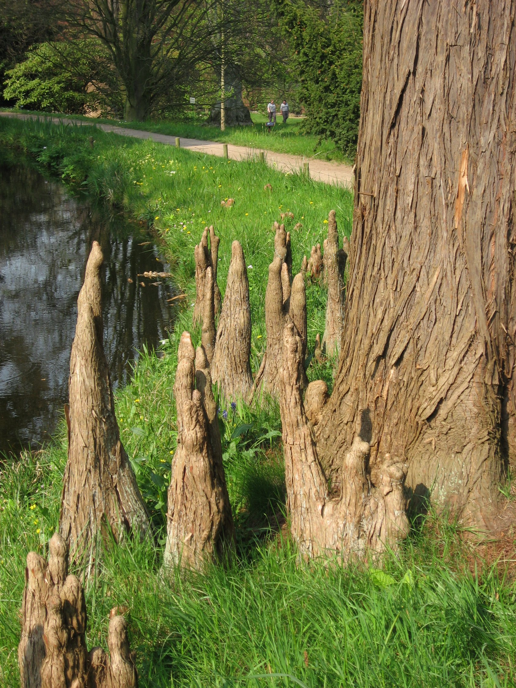 Racine aérienne (Pneumatophore) de Taxodium ascendens 'Nutans' (Cyprès des étangs) in Arboretum de la Vallée-aux-Loups Map: 48° 46' 22" N 2° 16' 5" E